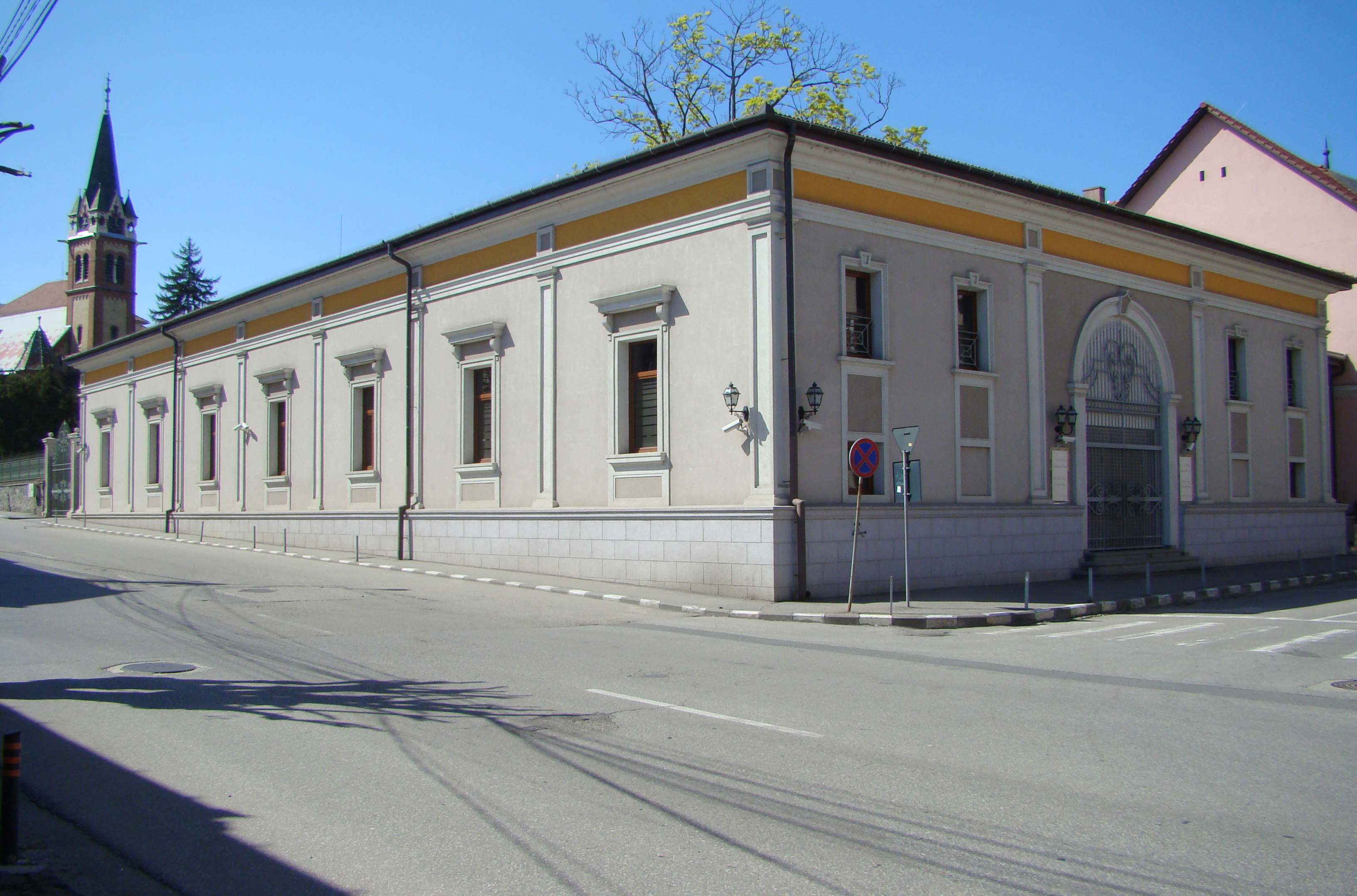 Ansamblul urban „Str. George Barițiu”, municipiul Deva, str. Barițiu George 1-25; 2-12 01